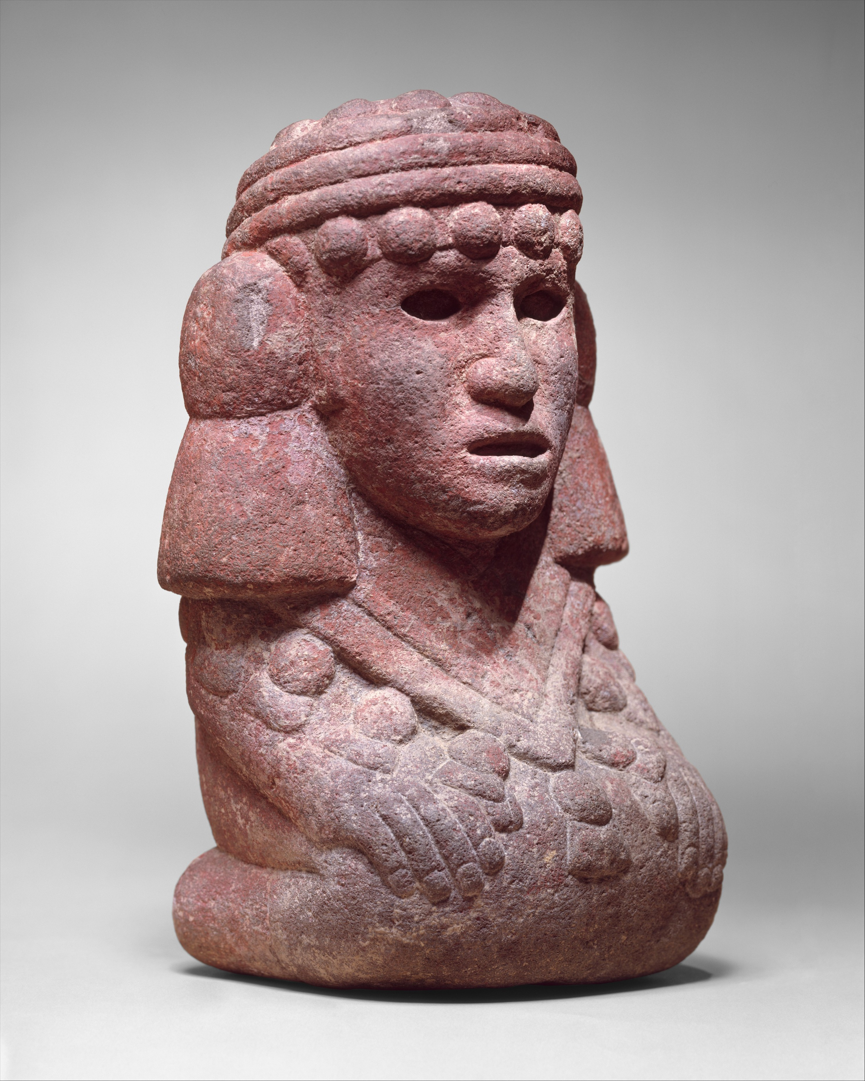 Aztec; Figure; Stone-Sculpture